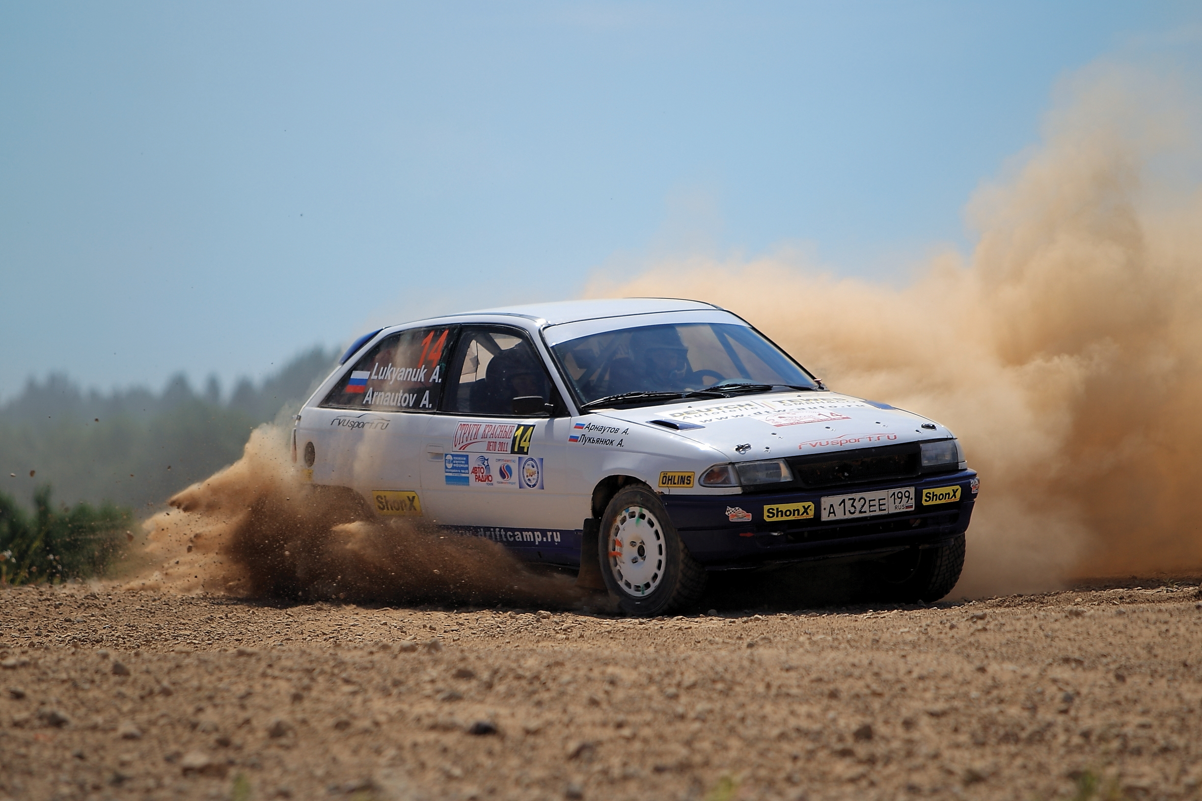 Обладатели Кубка России по ралли 2011 года в классе 2000Н - экипаж Алексей Лукьянюк и Алексей Арнаутов Unknown